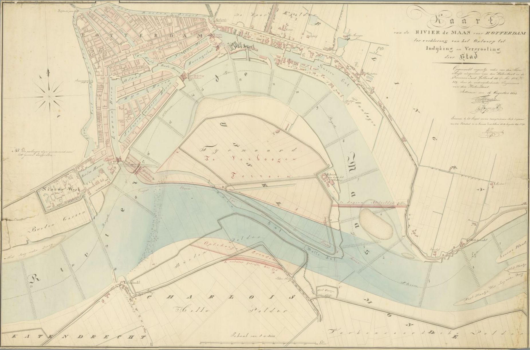 Kaart van de Rivier de Maas voor Rotterdam ter verklaring van het Ontwerp tot Indijking en Vergroting der Stad, 30 Augustus 1834